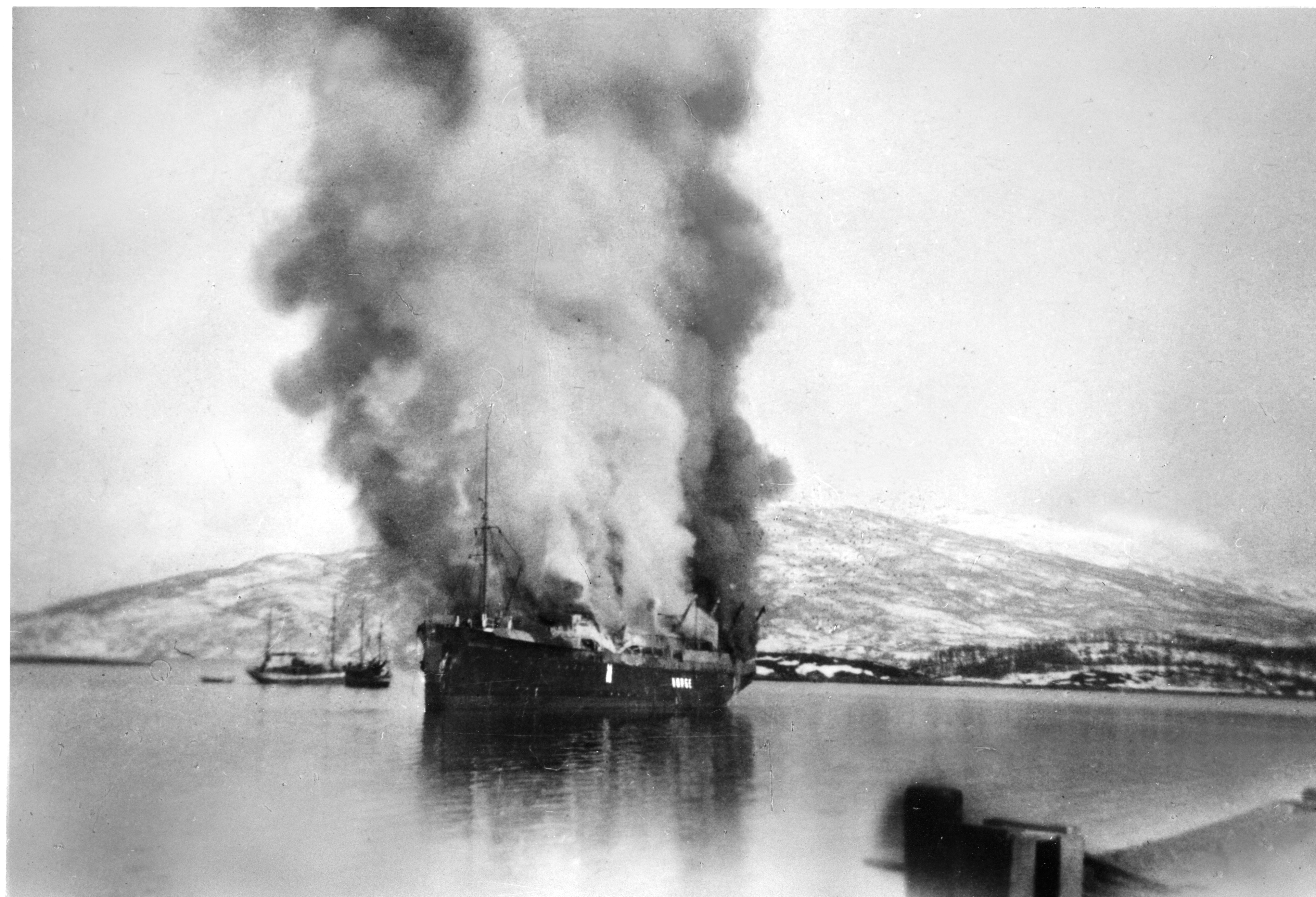 Bildet er hentet fra Arkivverket. Det tidligere hurtigruteskipet "Dronning Maud" har blitt bombet av tyske fly. Skipet står i brann og mørk røyk velter opp mot himmelen. Arkivinstitusjon : Riksarkivet Arkivnavn : Forsvaret, Forsvarets krigshistoriske avdeling Sted : NORGE, Troms, Gratangen, Emneord: Andre verdenskrig, 2. verdenskrig, Brann, Nord-Norge, Skip, Bombing, Hurtigruta Avbildet